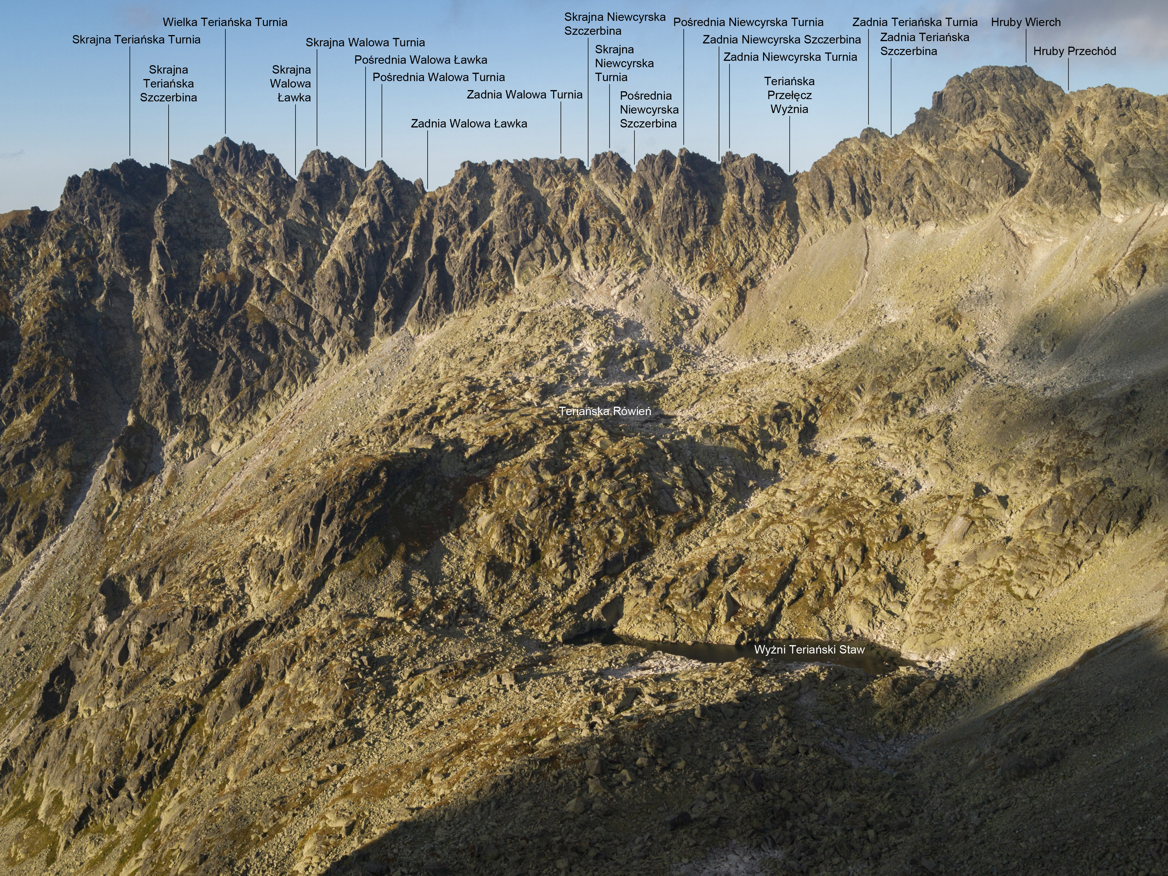 Wschodnia część Grani Hrubego (Teriańskie, Walowe i Niewcyrskie Turnie) oraz Hruby Wierch ponad górnymi piętrami doliny Niewcyrki.